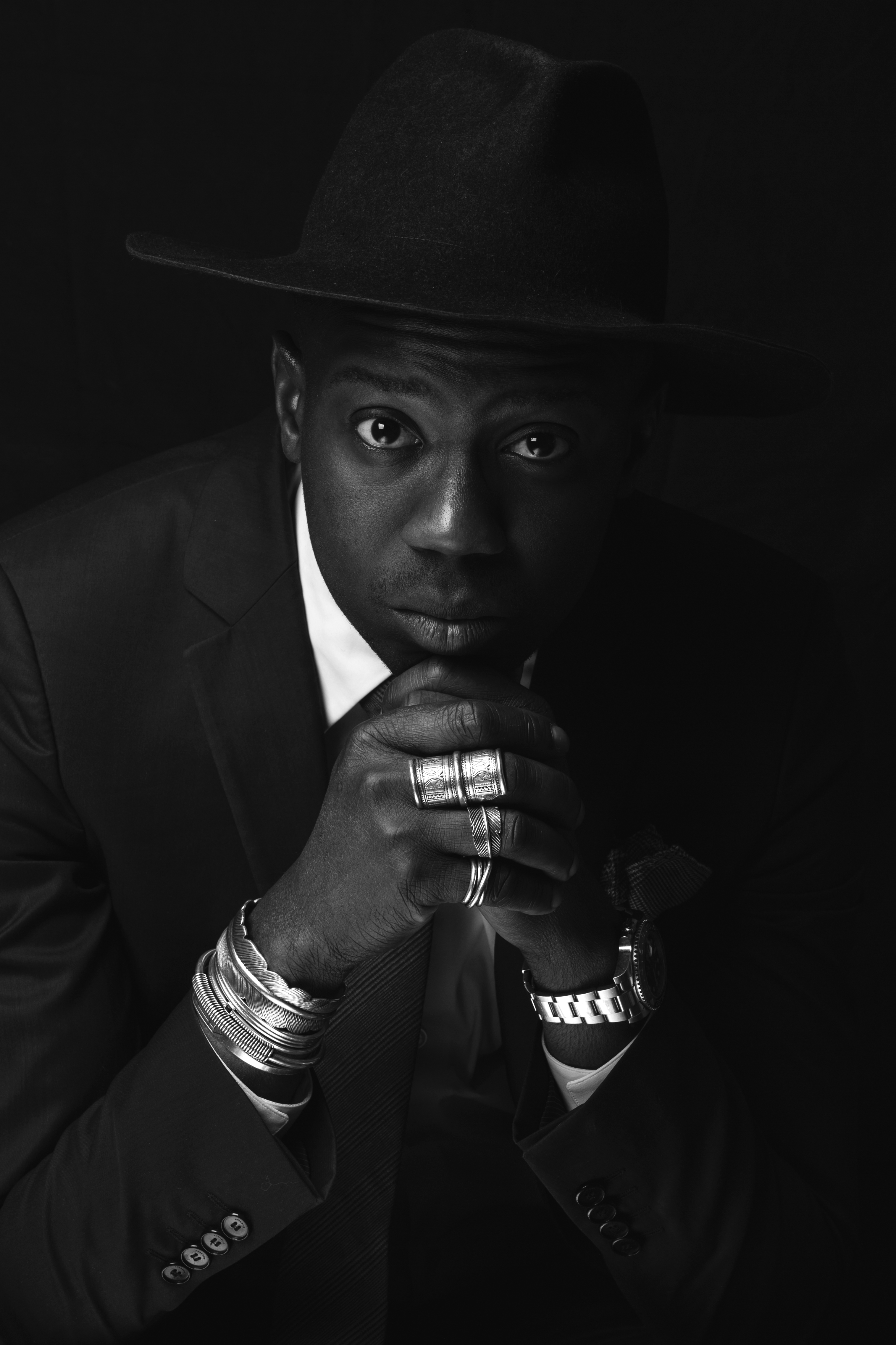 Steves Hounkponou (portrait Noir et Blanc)